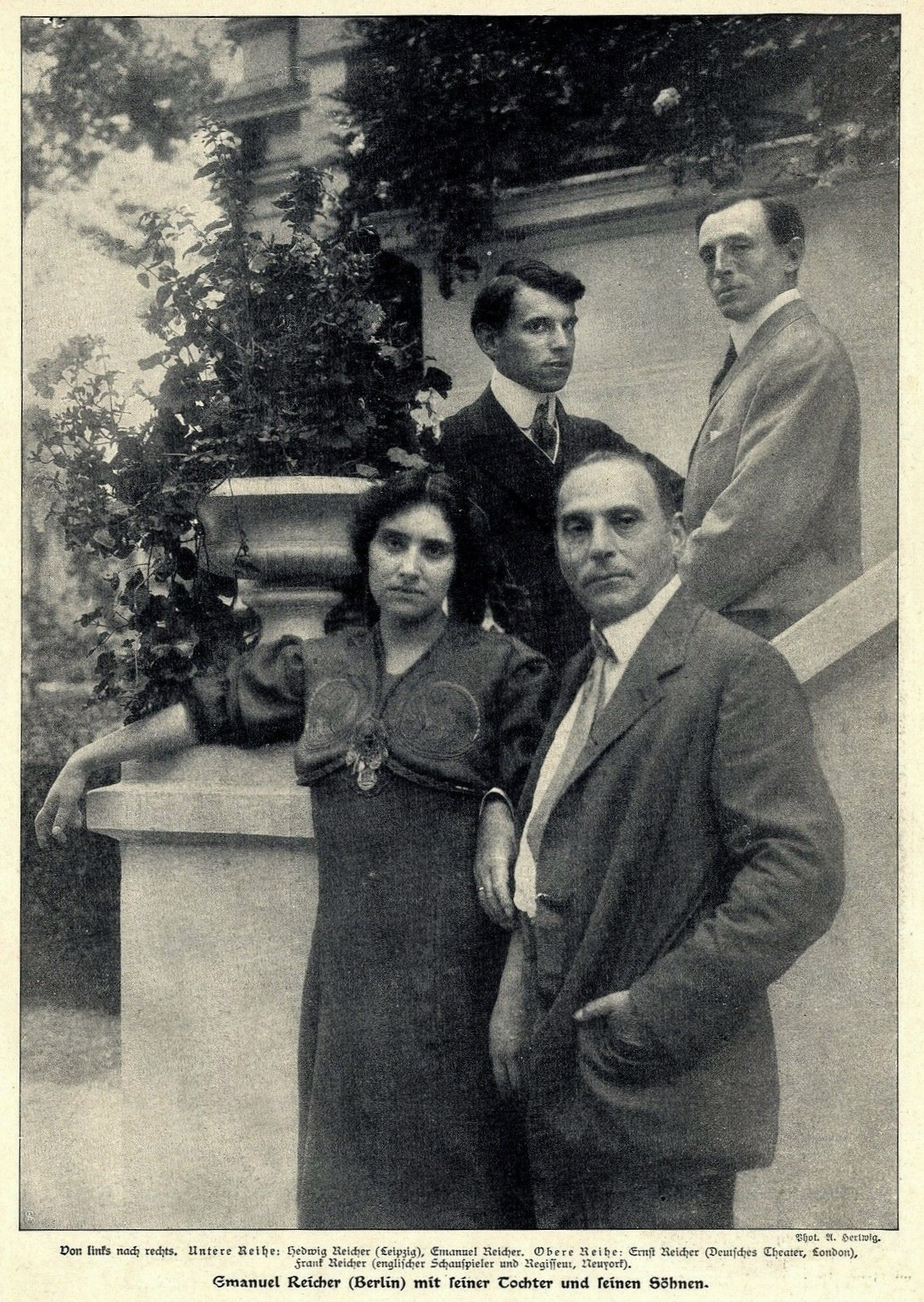 Emanuel Reicher mit seiner Tochter Hedwiga Reicher und seinen Söhnen Ernst Reicher und Frank Reicher, 1907